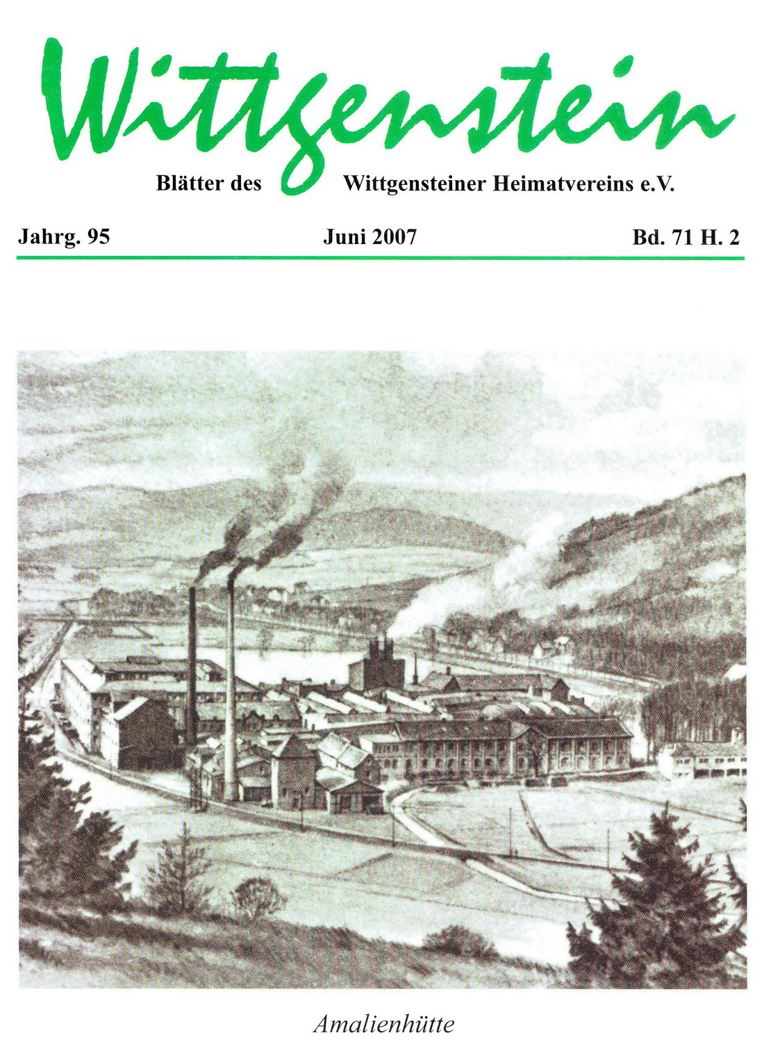 Titel der Zeitschrift Wittgenstein, Heft 2, 2007